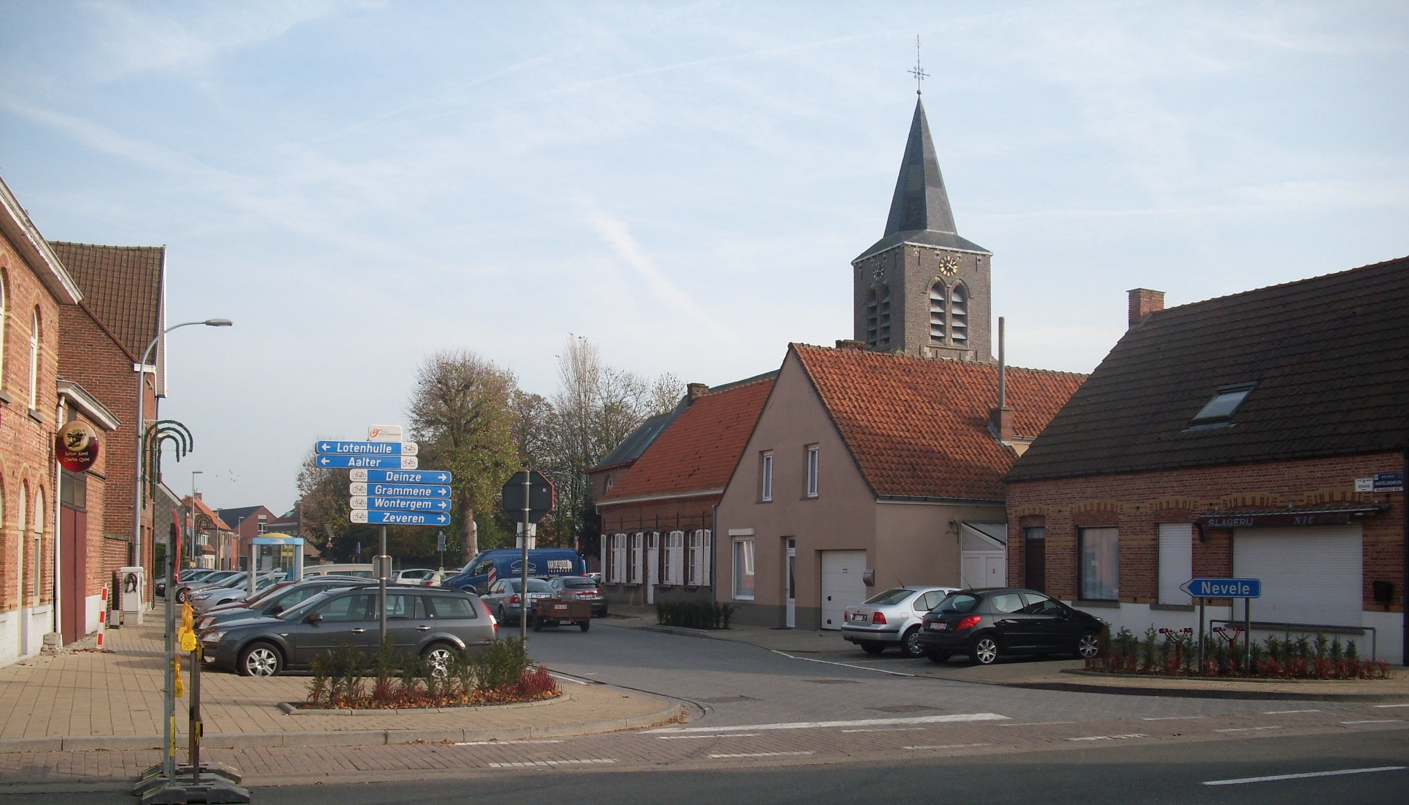 Dorpskom van Vinkt - Martelarenplein - Vinkt - Deinze - Oost-Vlaanderen - België